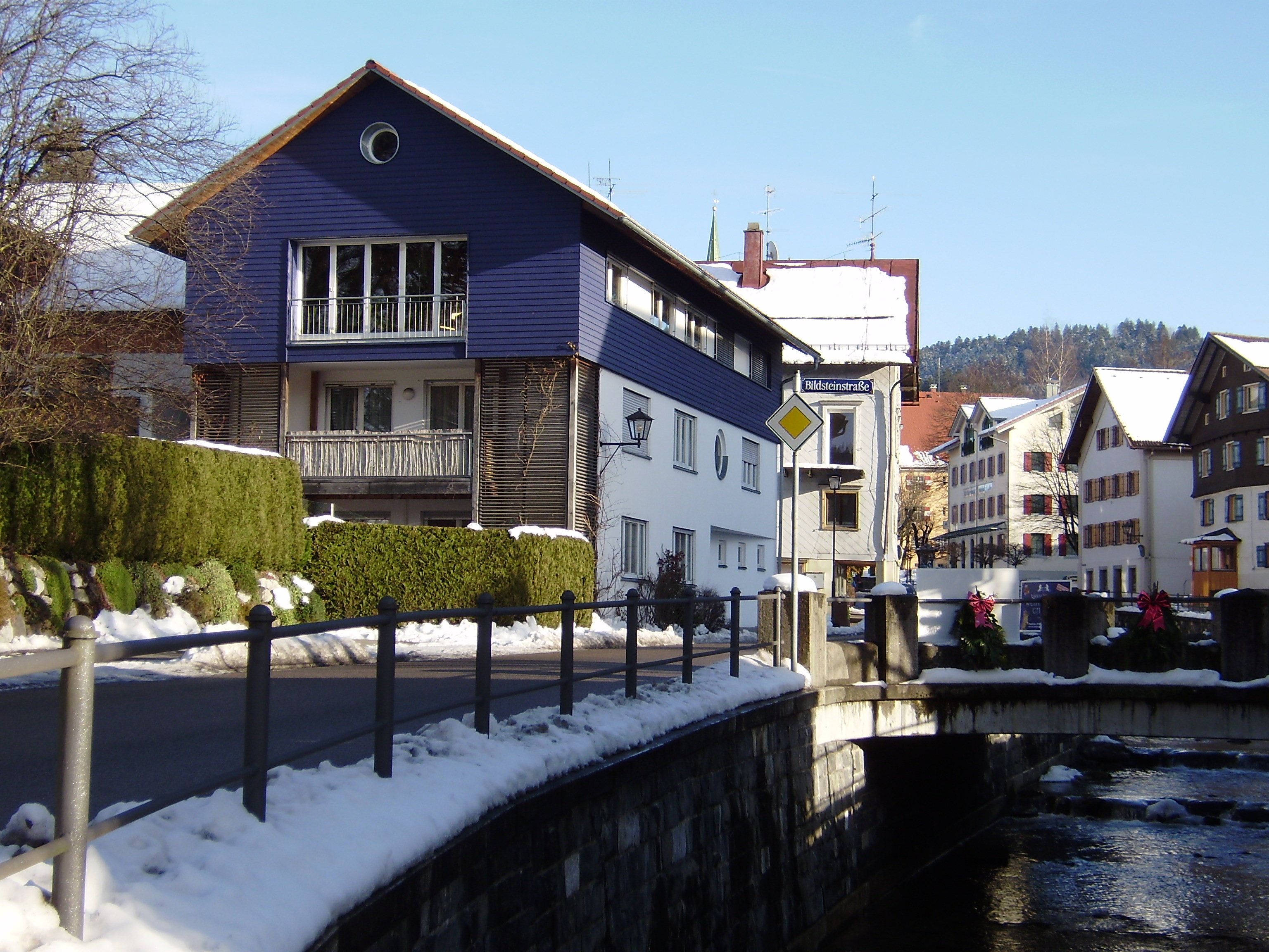 Hieronymus Fäßlers Elternhaus, Hauptstraße 36, D-88171 Weiler im Allgäu